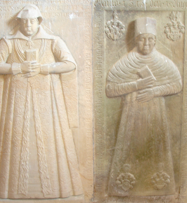 Raszów, kościół fil. p.w. Niepokalanego Poczęcia NMP, XV